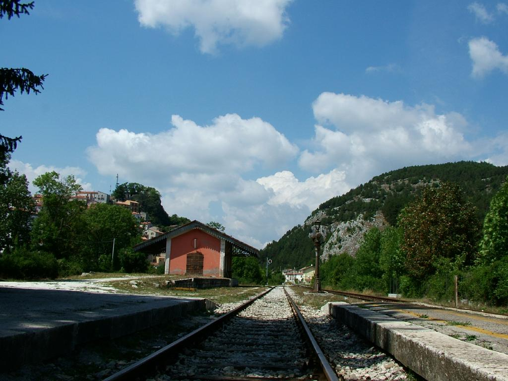 Stazione ferroviaria di Carpinone